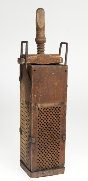 Ostepresse fra Sørum i Akershus. Pressen er laget av tre med beslag av jern. NFL.16412.